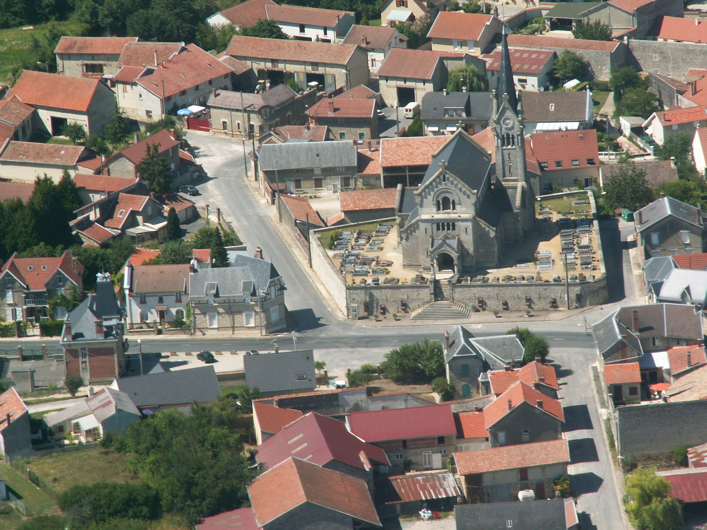 VUE DE LA MAIRIE ET DE L'EGLISE DE BRIMONT